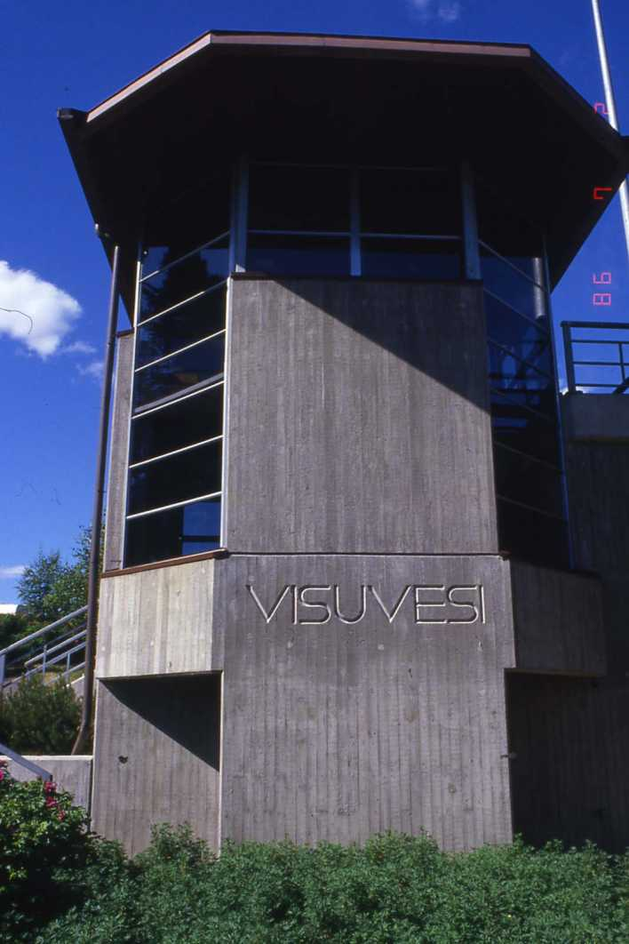 Visuvesi kanavarakennus